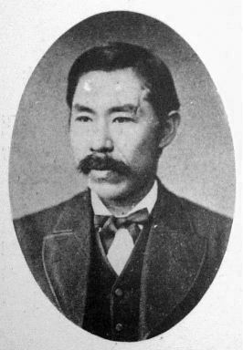 a Japanese man 新島襄 (Jo Niijima)